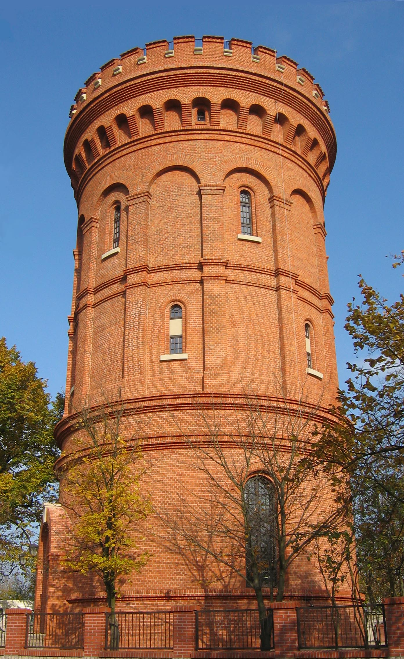 Obserwatorium Astronomiczne w Olsztynie